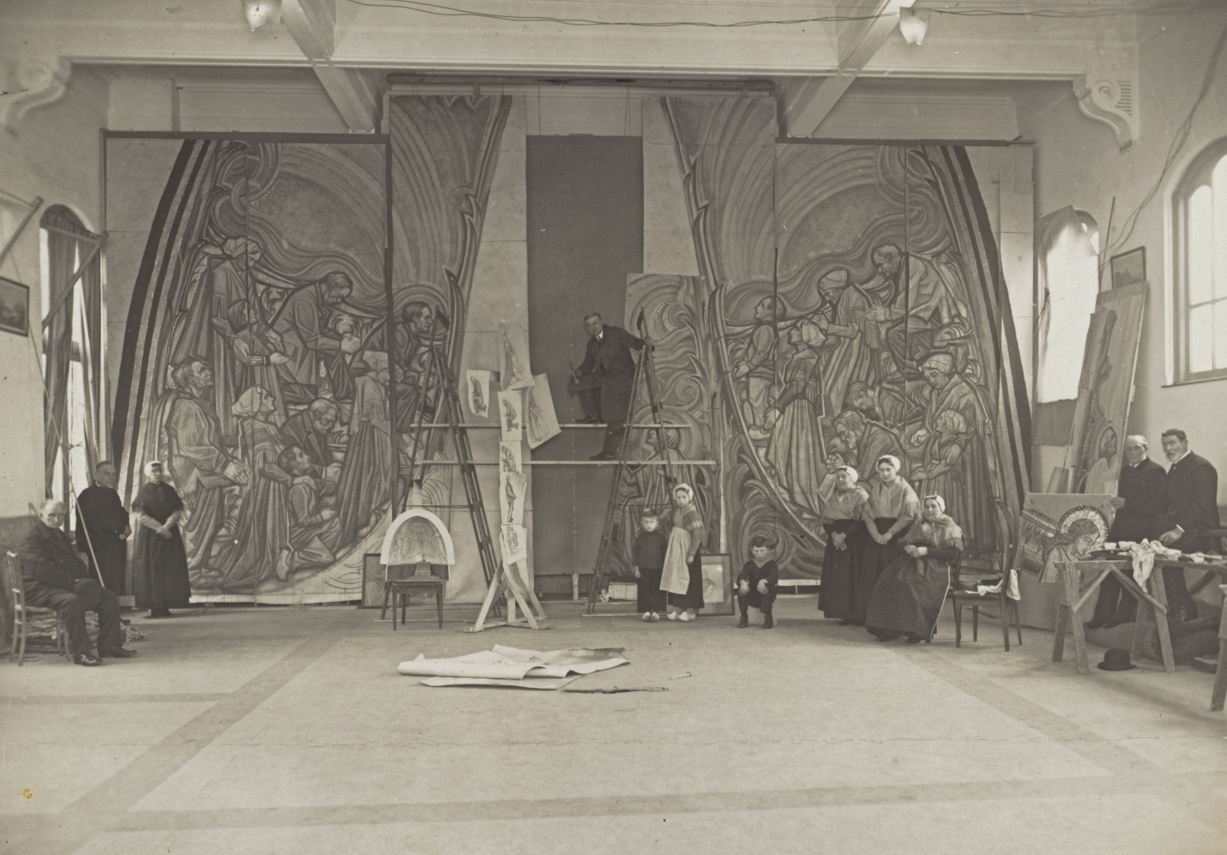 Anton Molkenboer in zijn tijdelijk atelier in Scheveningen, bezig met een ontwerp voor een glasmozaiëk voor de Heilige Antoniuskerk in Scheveningen